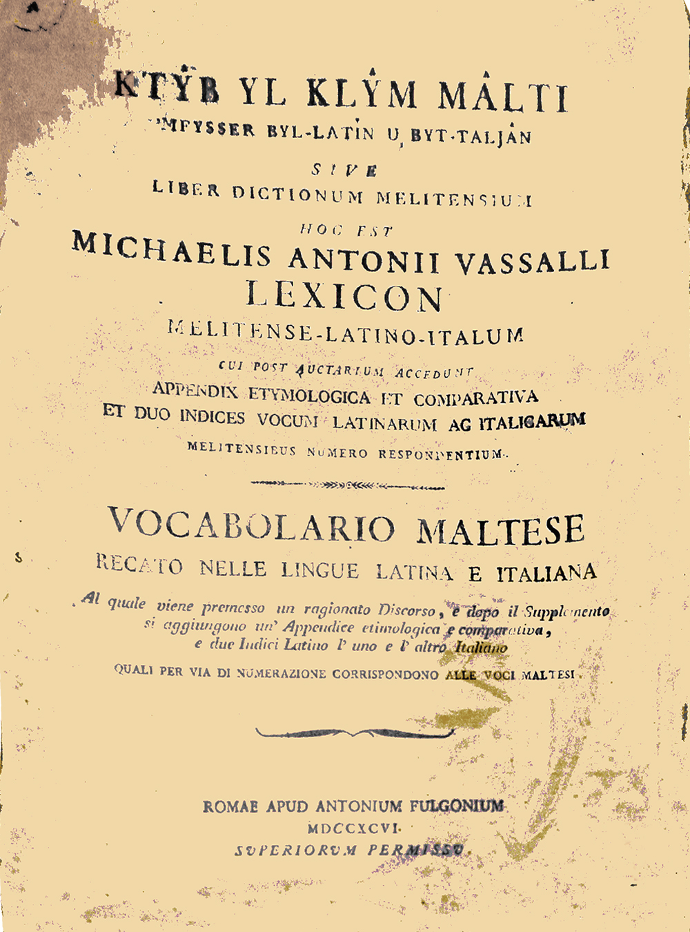 édition originale de 1796 du Lexicon de Mikiel Anton Vassalli